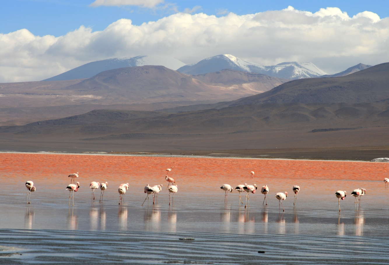 Andean Flamingos (Phoenicoparrus andinus) and Puna Flamingos (Phoenicoparrus jamesi) at Laguna Colorada, Uyuni, Bolivia